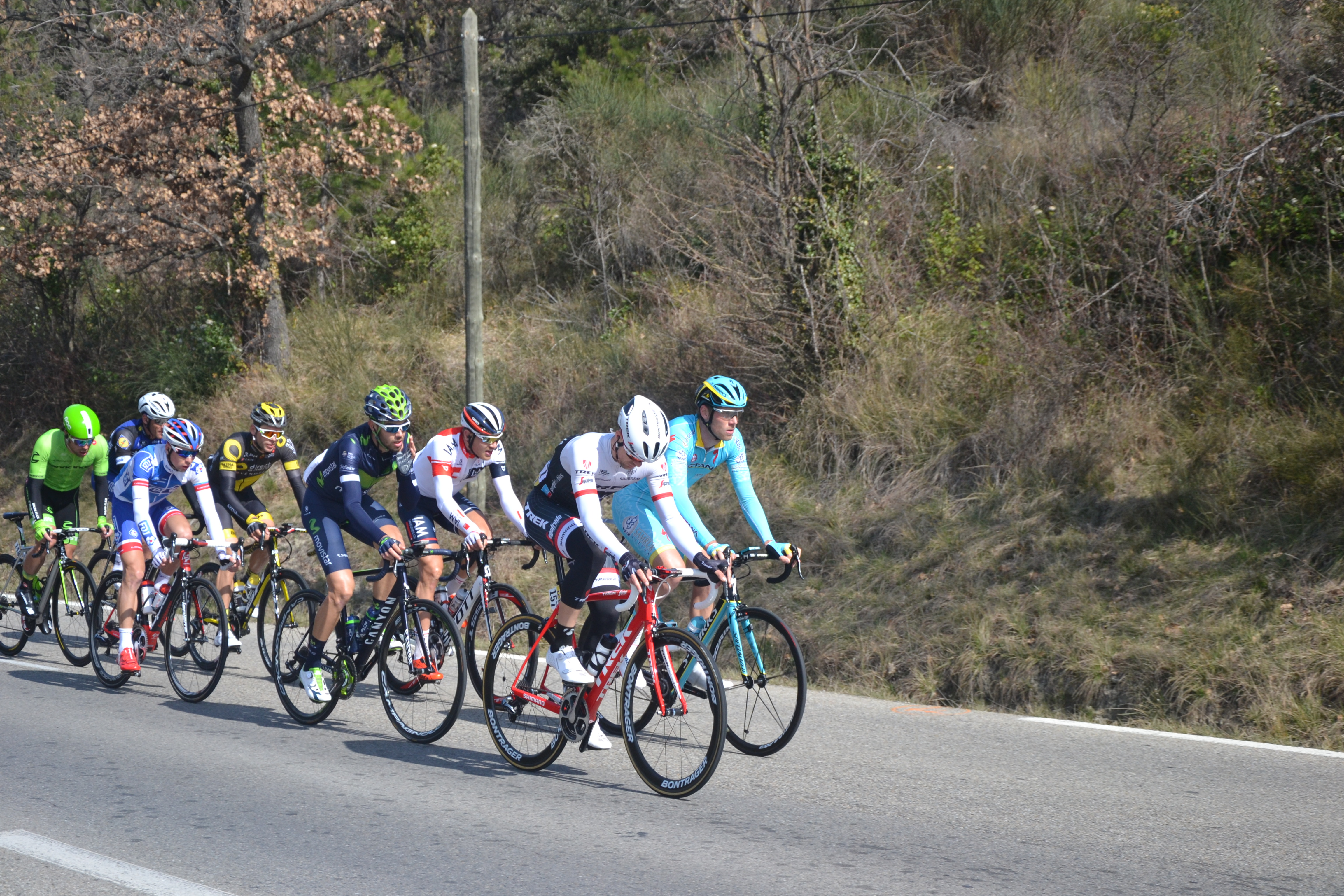 échappée de l'étape 5 du Paris-Nice 2016, à la sortie de Malaucène, dans le Vaucluse